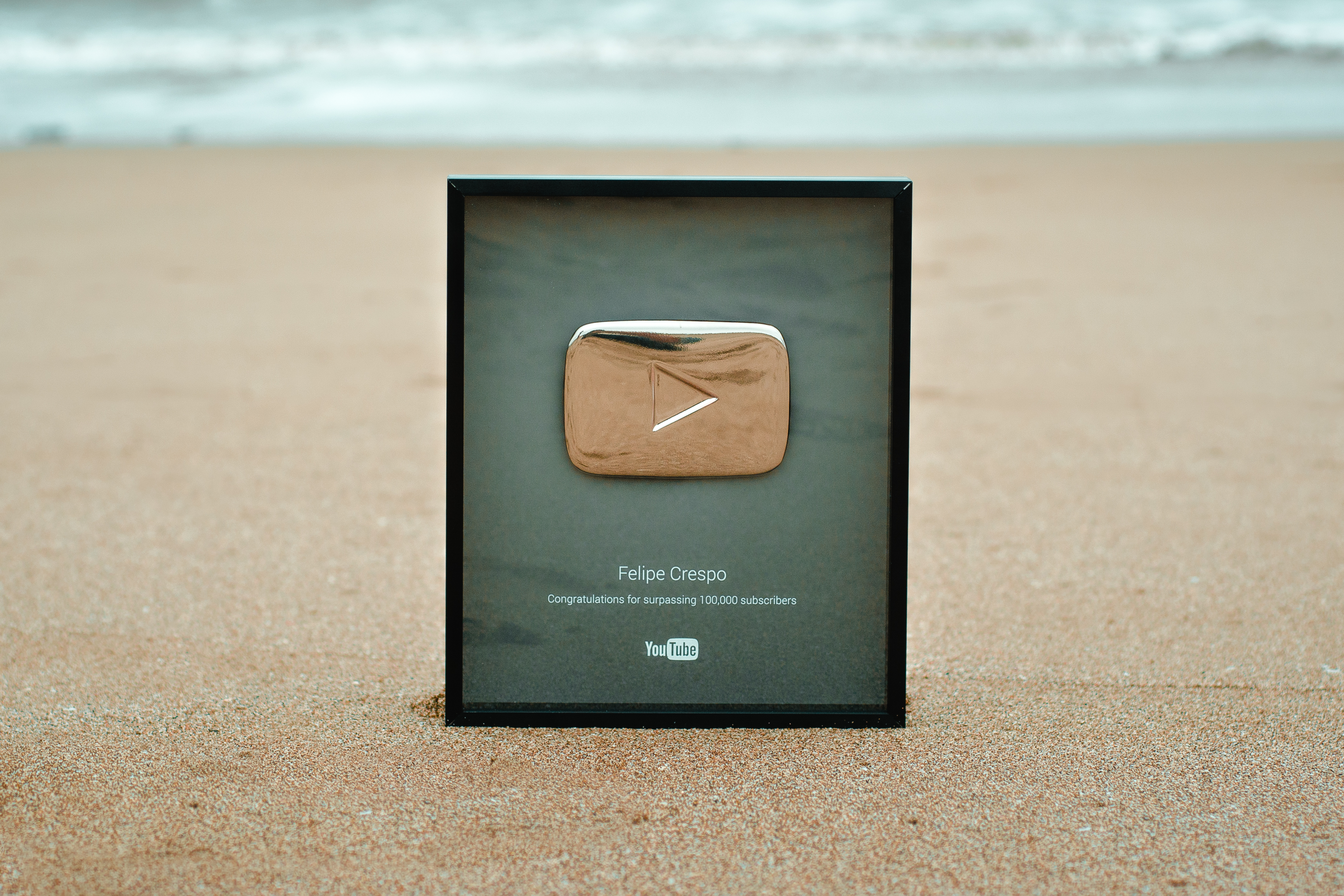 El Botón de Plata de YouTube de Felipe Crespo en la playa de San Lorenzo, Manabí, en 2017.